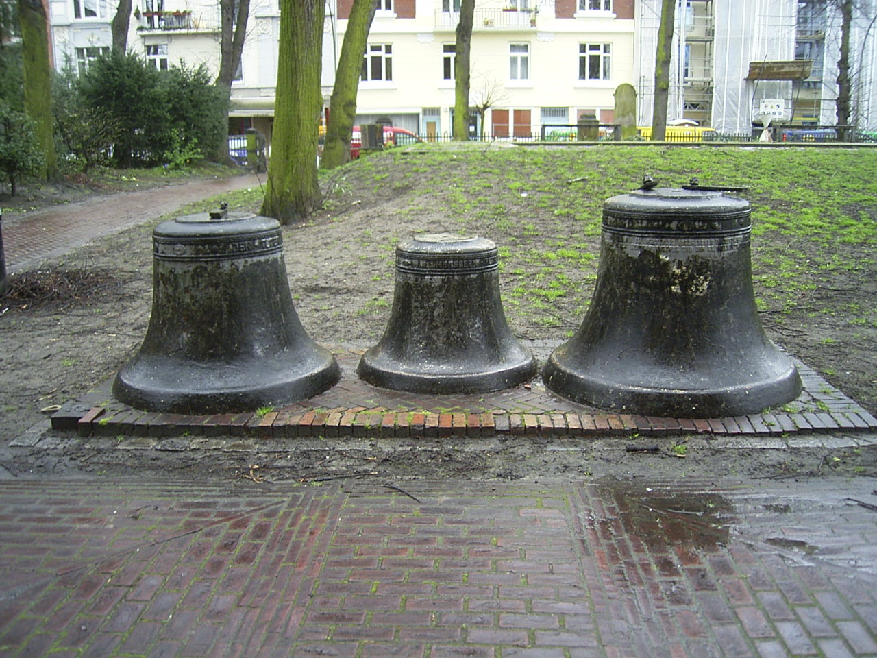 Alte Kirchenglocken vor der Pfarrkirche St. Pauli in St. Pauli.